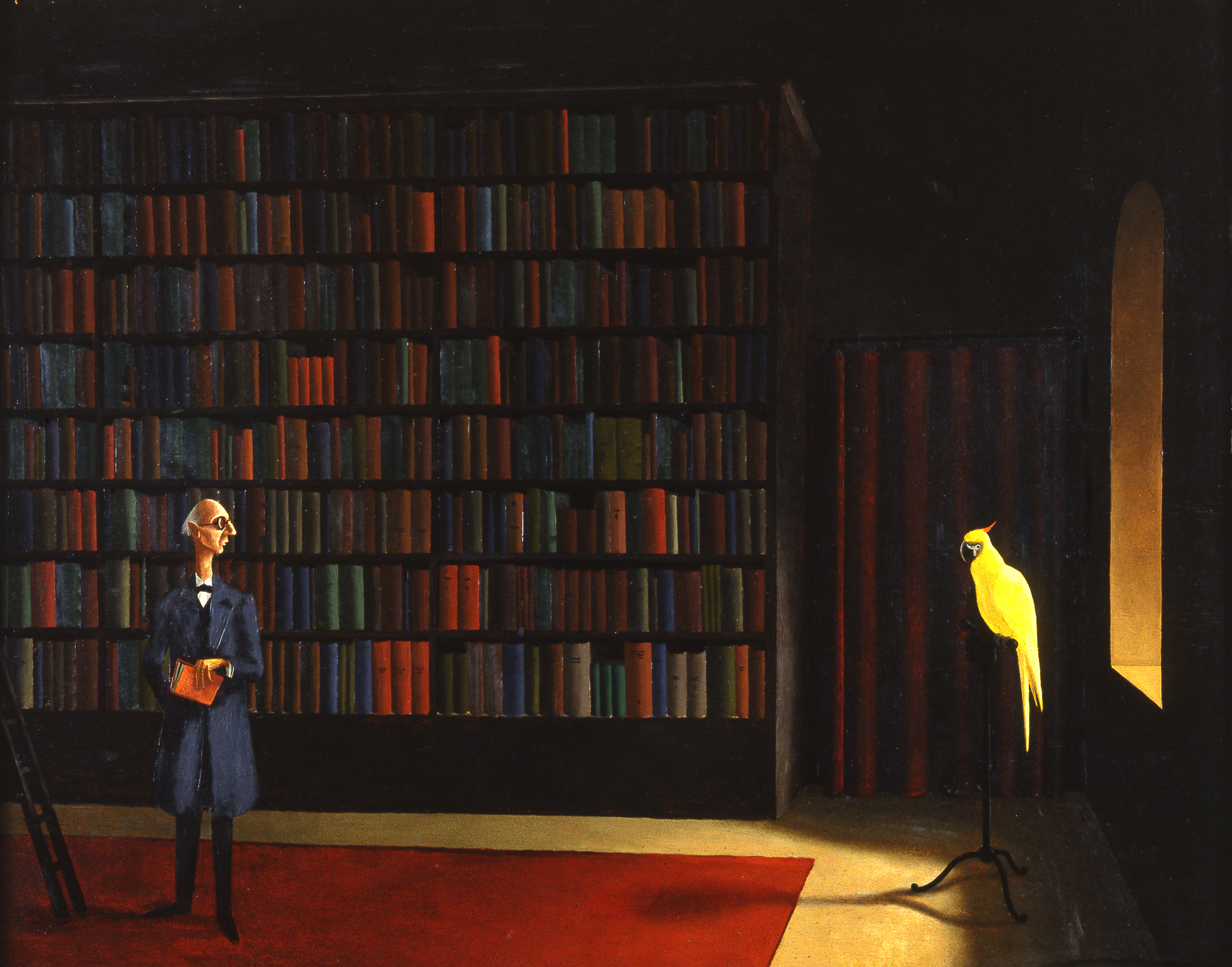 Bibliothek